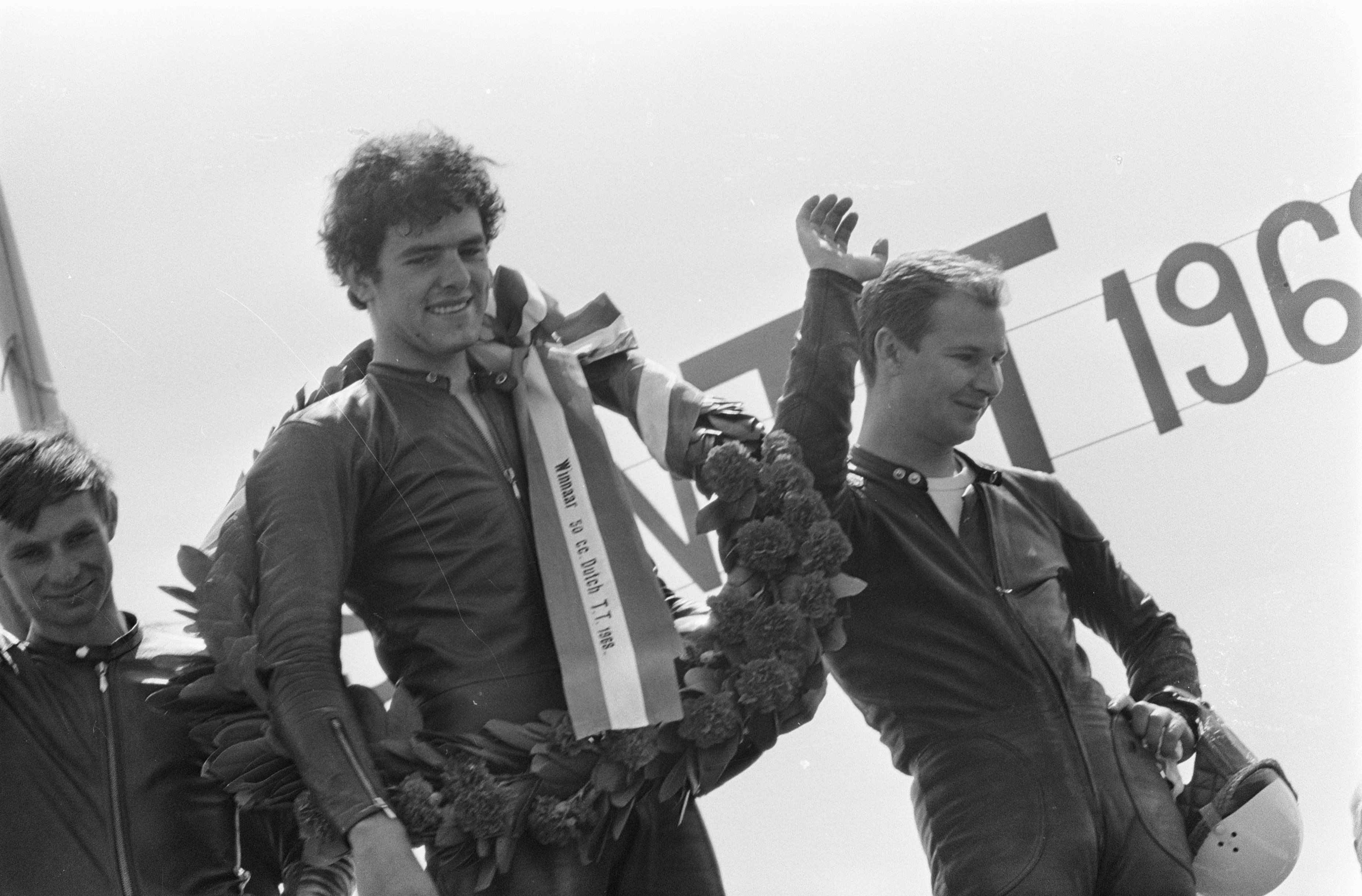 Collectie / Archief : Fotocollectie Anefo Reportage / Serie : [ onbekend ] Beschrijving : TT Assen. 50cc Lodewijkx (11) links en rechts Hans G. Anscheidt (2) op podium Datum : 2 juli 1968 Locatie : Assen Trefwoorden : podia Fotograaf : Nijs, Jac. de / Anefo Auteursrechthebbende : Nationaal Archief Materiaalsoort : Negatief (zwart/wit) Nummer archiefinventaris : bekijk toegang 2.24.01.05 Bestanddeelnummer : 921-4814